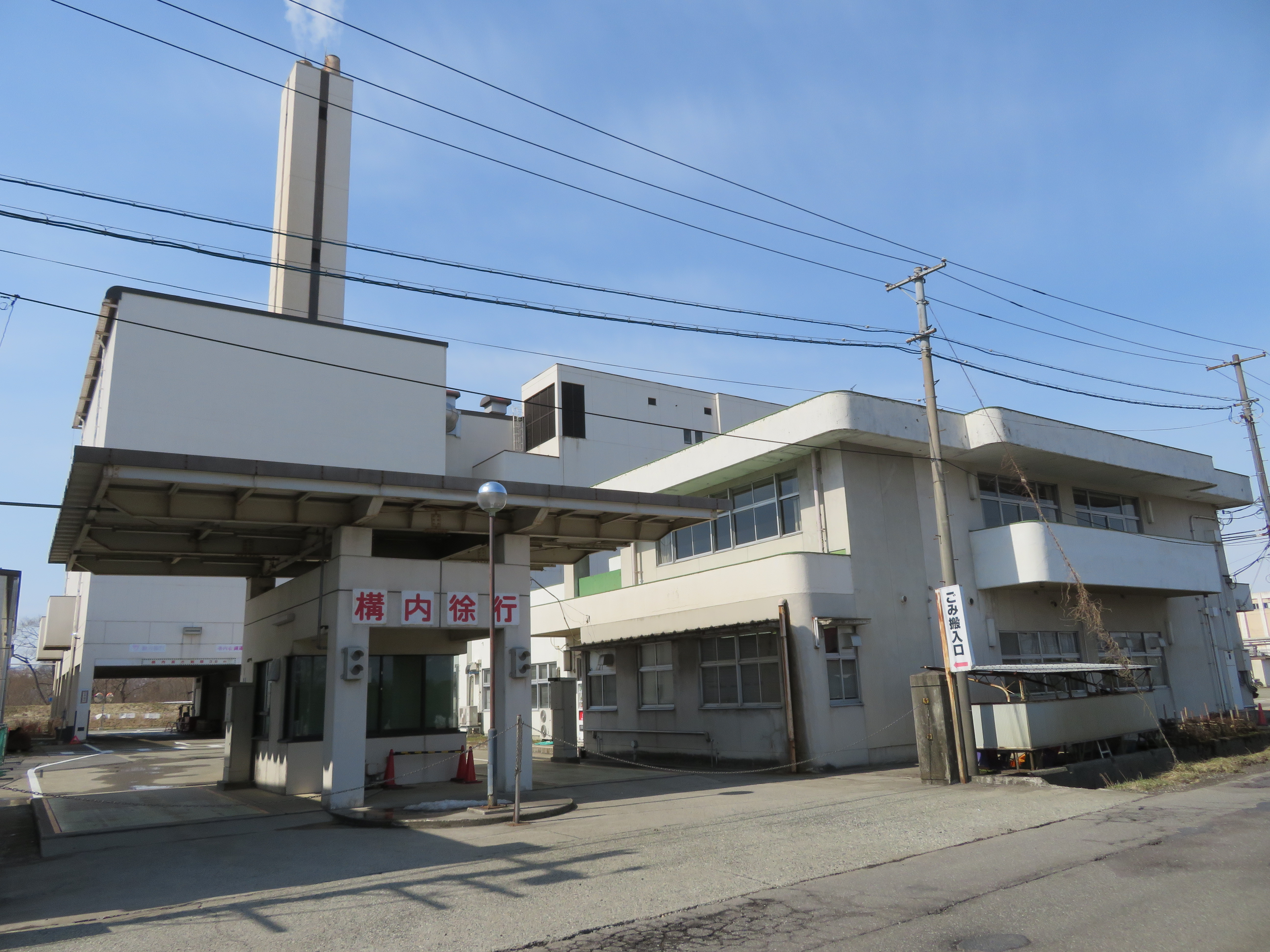 会津若松地方市町村圏整備組合のごみ焼却施設